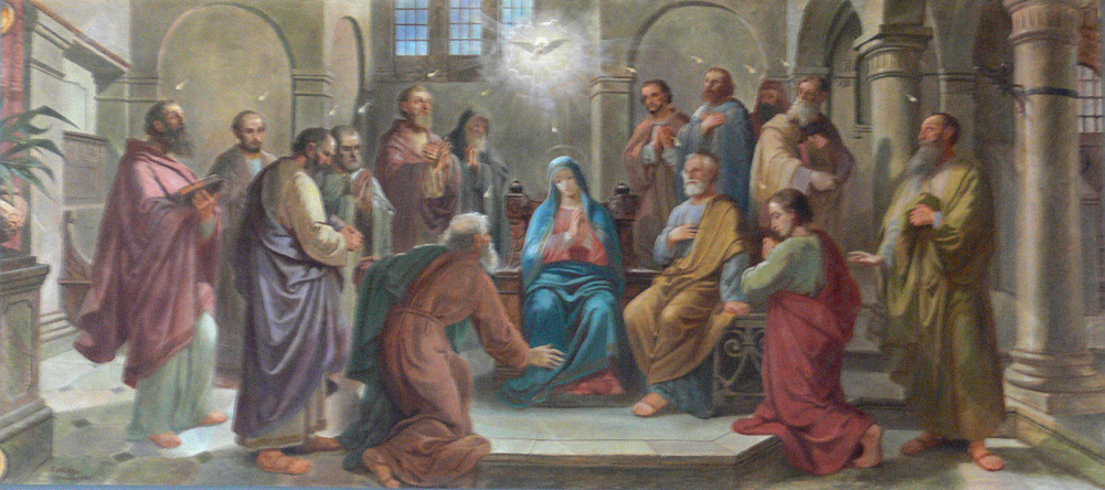 Pfarrkirche St. Gebhard, Maierhöfen (Allgäu) Gemälde an der Orgelempore: Pfingstwunder